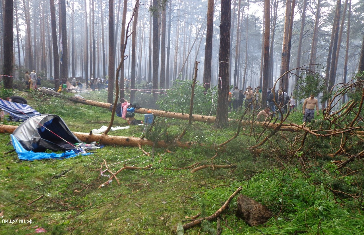 Упавшие деревья на Ильменском фестивале в 2014 году, город Миасс, Челябинская область, Россия